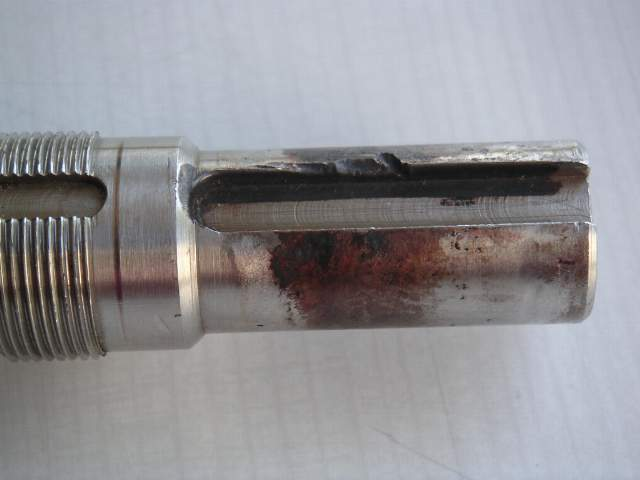 Corrosion de contact sur un bout d'arbre en acier inoxydable